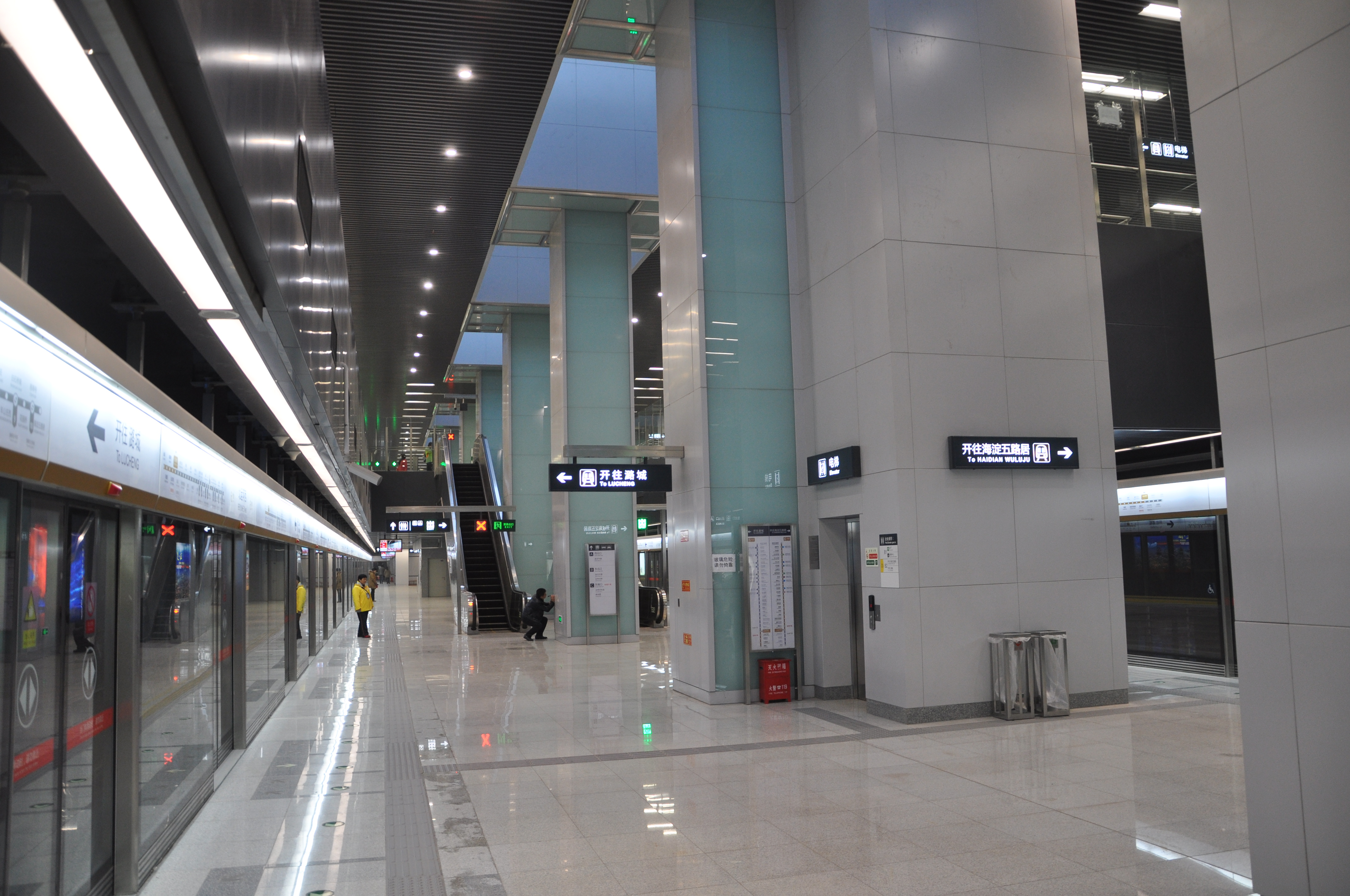 北运河西站站台，上方没有站厅层楼板。